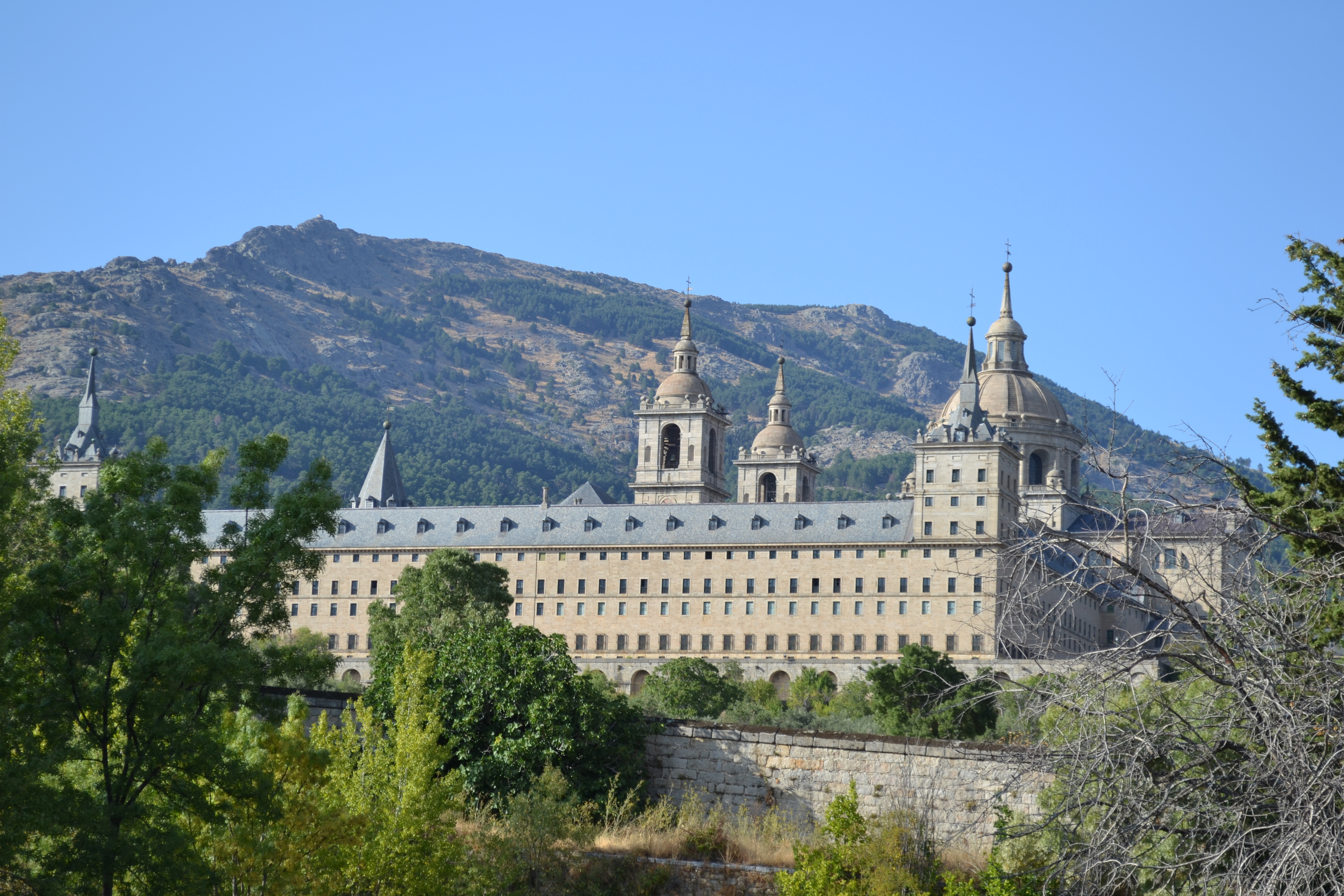 Vista del Monasterio de El Escorial desde el Sur-Sudeste.